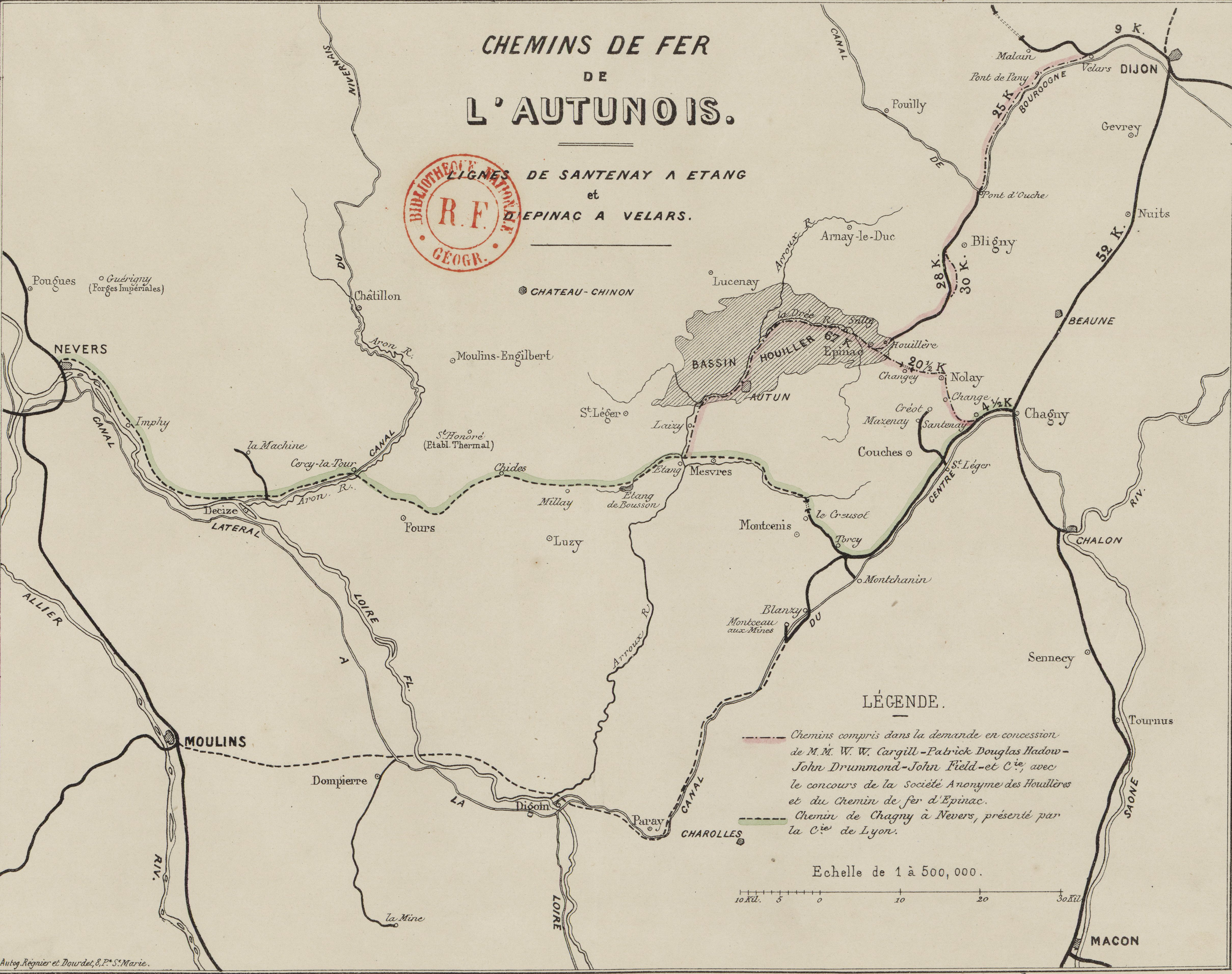 Chemin de fer de l'Autunois. Lignes de Santenay à Etang et d'Epinac à Velars : Chemin compris dans la demande en concession de MM. W. A. Cargill-Patrick Douglas Radow-John Drummond-John Field et Cie... ; Chemin de Chagny à Nevers / présenté par la Cie de Lyon